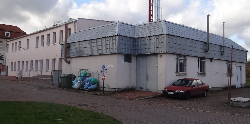 Pralnia przy ul. Wojska Polskiego Szpitala Powiatowego SPW ZOZ